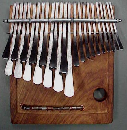 Mbira Dza Vadzimu "Kanuchi" by Fradreck Mujuru